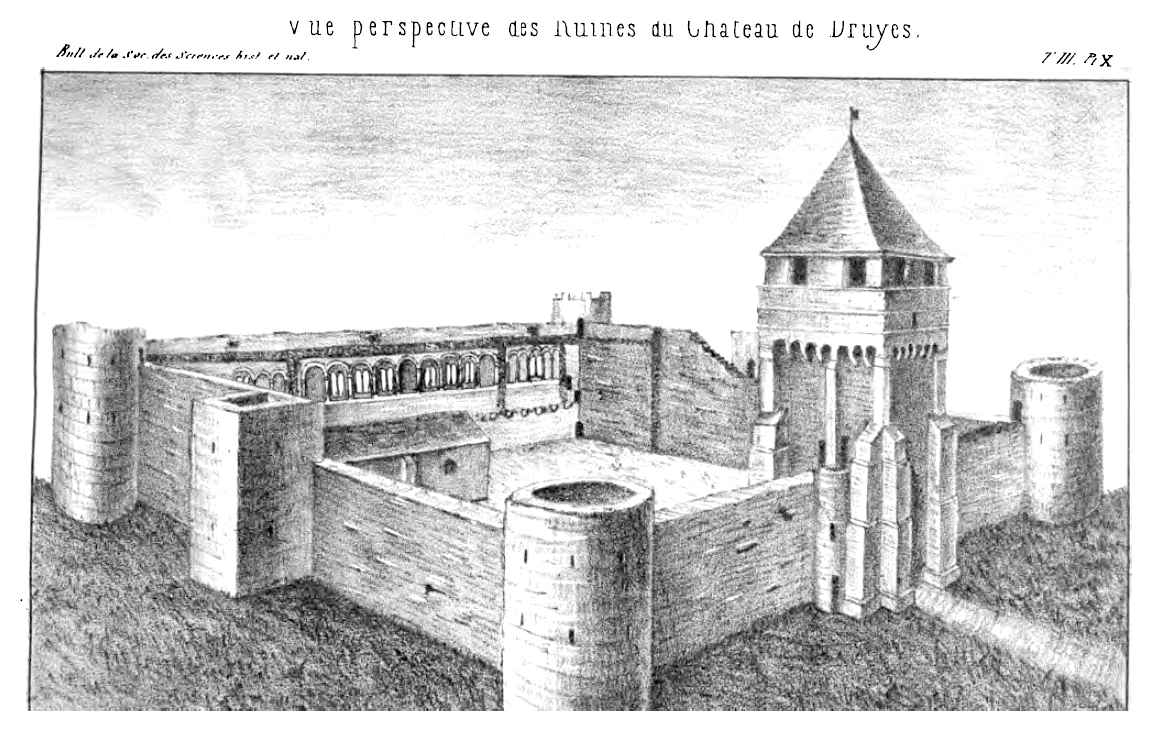 Château de Druyes, Yonne